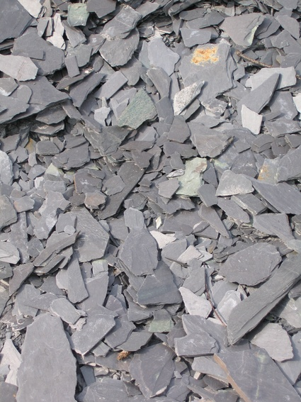 déchets de schistes ardoisiers